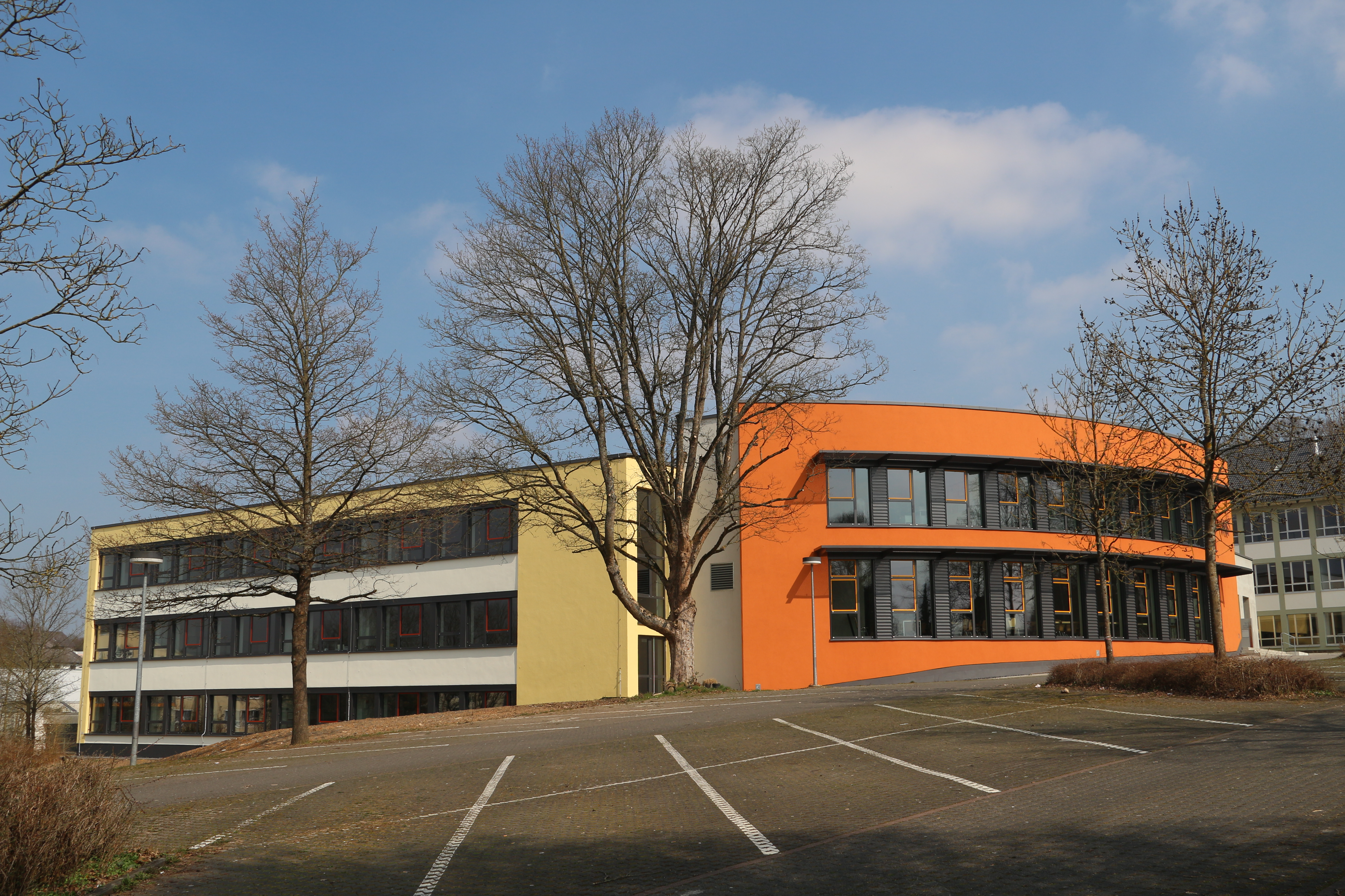 Weilburg